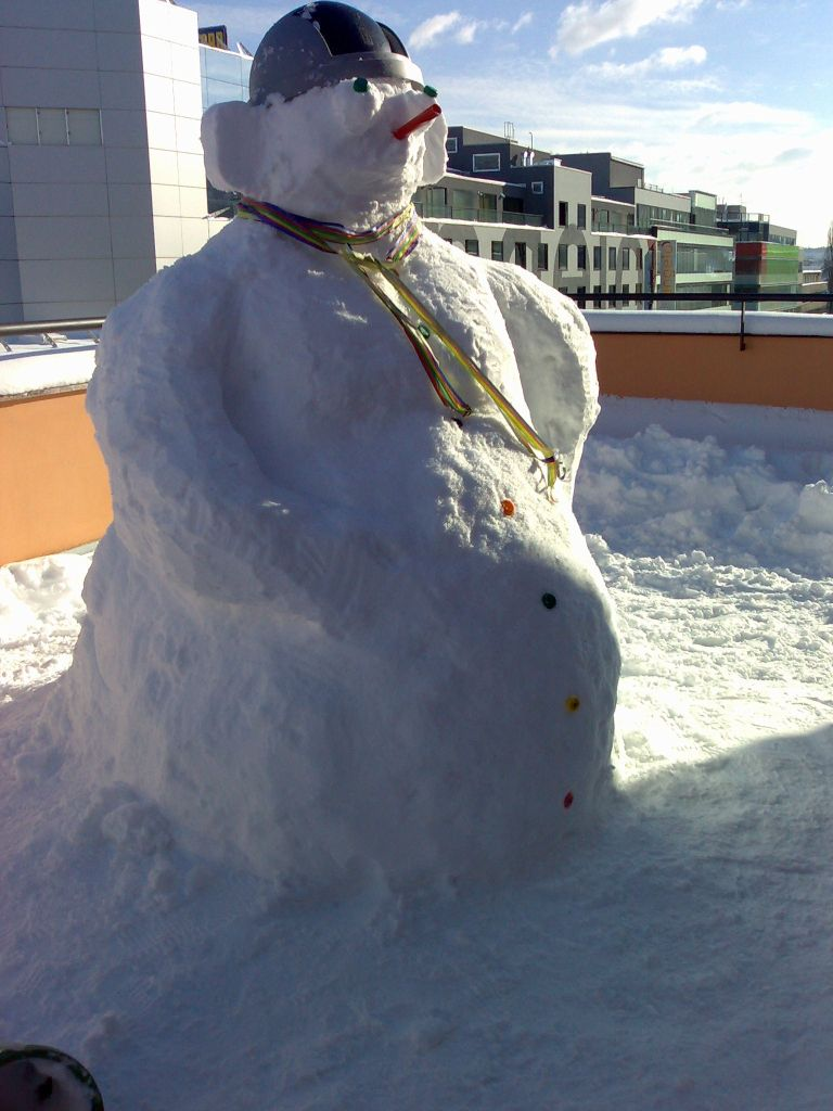 "sNehulák" postavený zaměstnanci společnosti Seznam.cz na terase jejich pracoviště